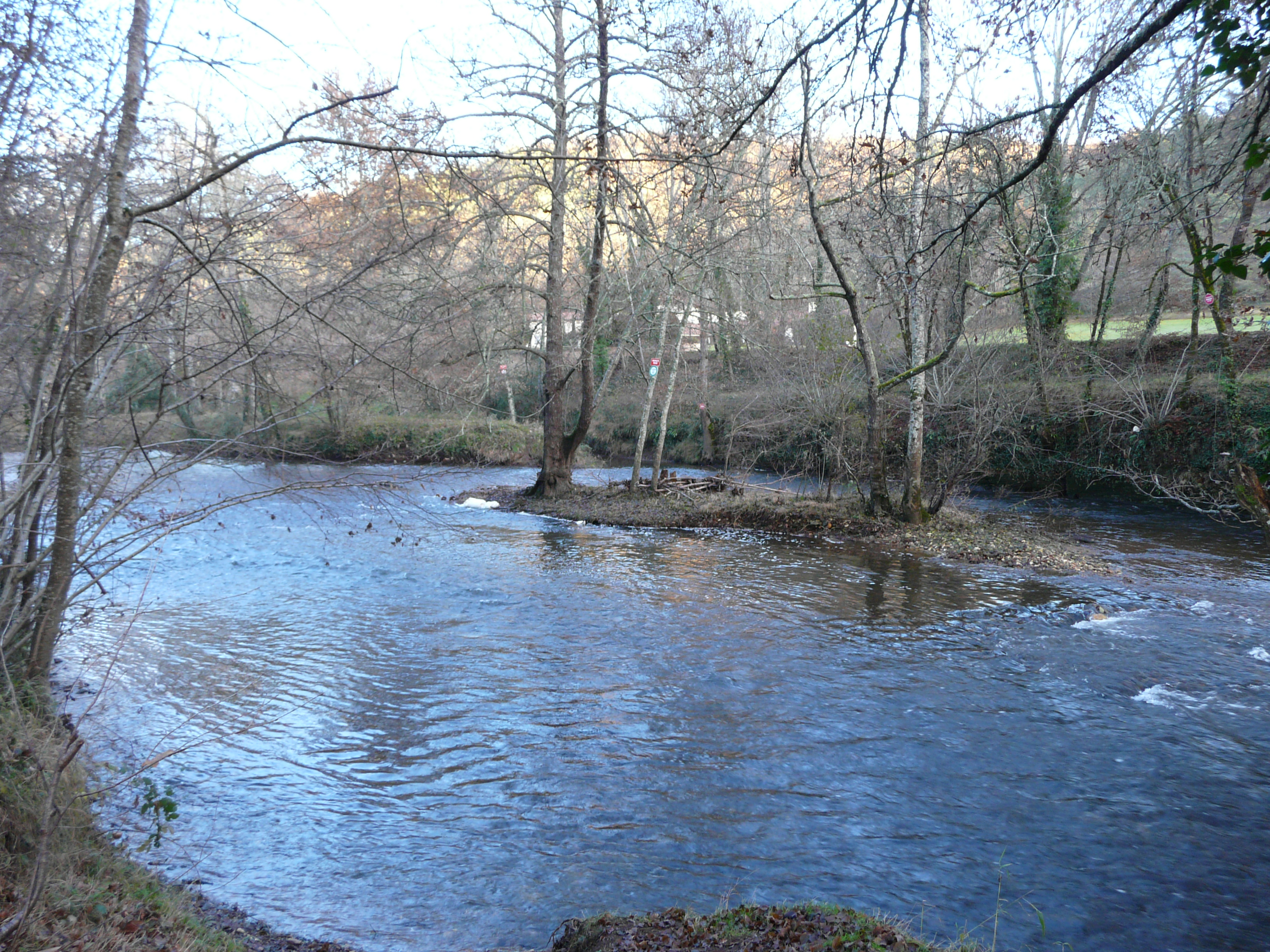 L'Auvézère au sud du lieu-dit Laborde (ou la Borde), Le Change, Dordogne, France. La rive opposée est sur la commune de Blis-et-Born. Vue prise en direction de l'amont.